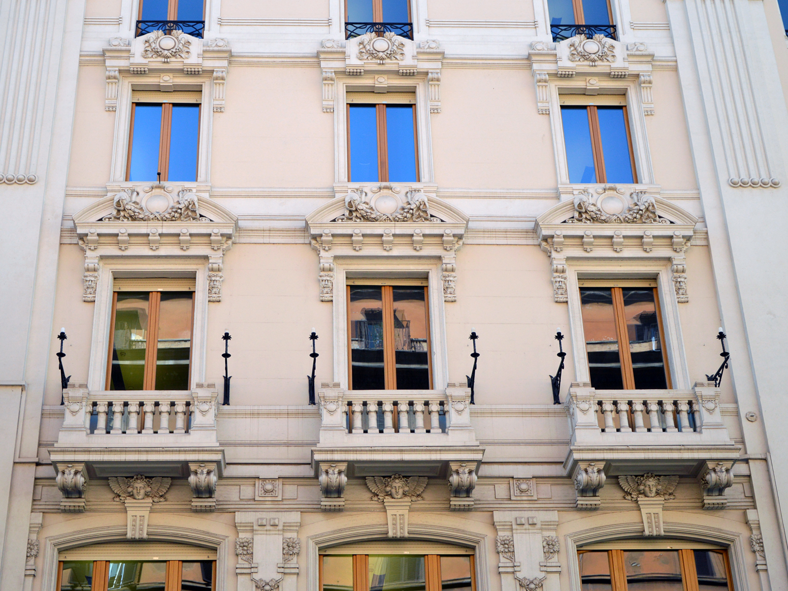 palazzo di via del Tritone 132 This is a photo of a monument which is part of cultural heritage of Italy.